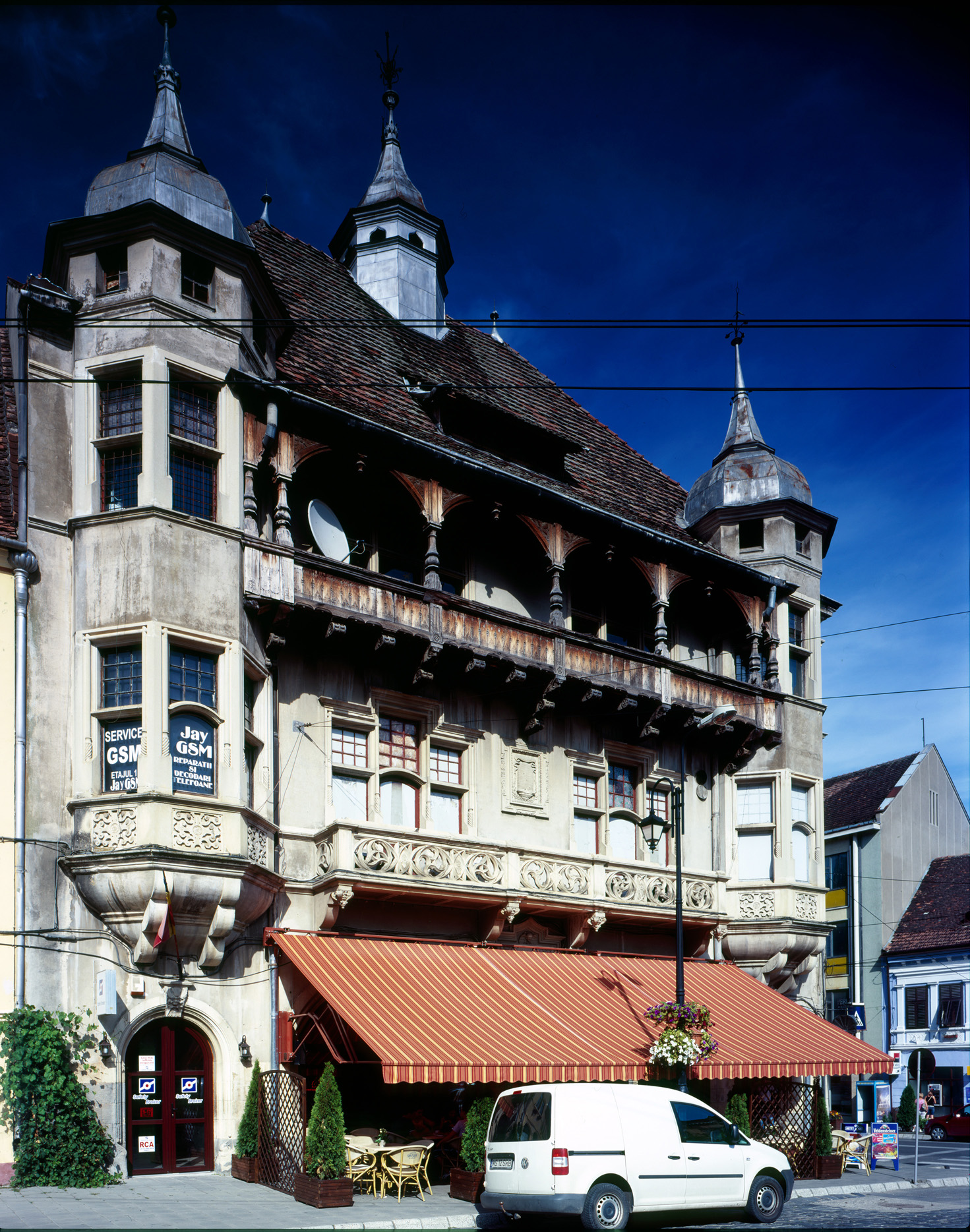 Fostul sediu al asociației breslașilor, azi birouri, spațiu comercial (la parter, Restaurant-Pizzerie Perla). Piața Hermann Oberth nr. 15, Sighișoara